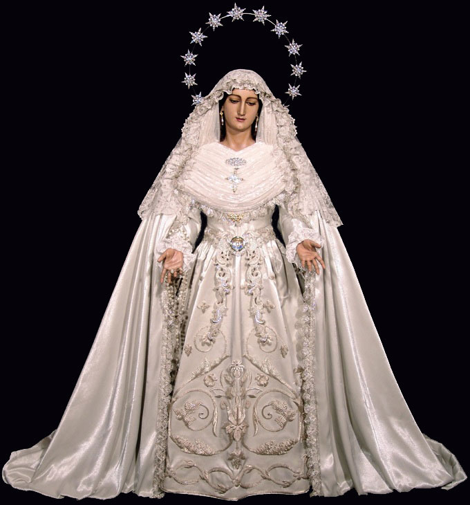 Virgen del Rocío (Málaga)